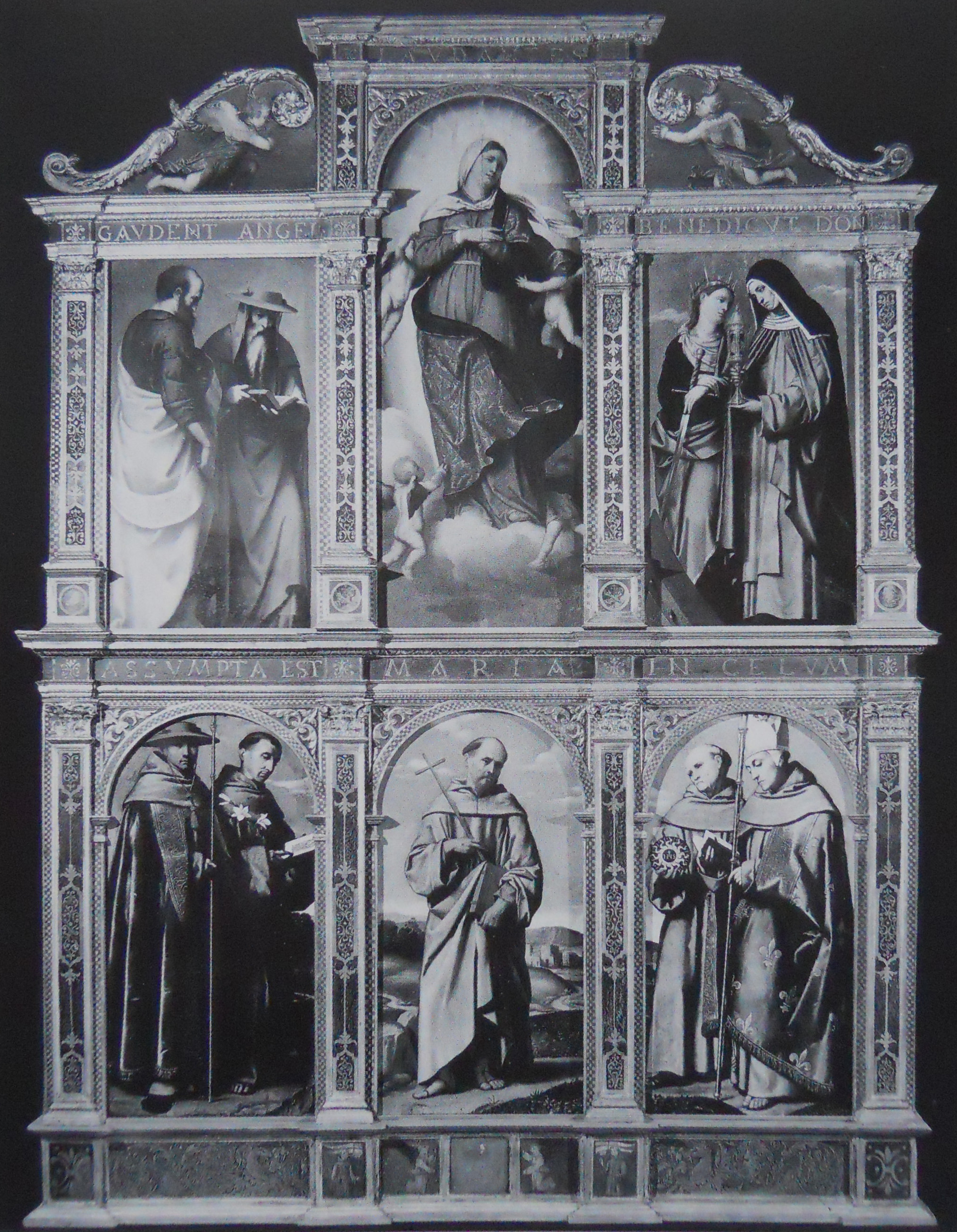 Polittico dell'Assunta (Moretto)